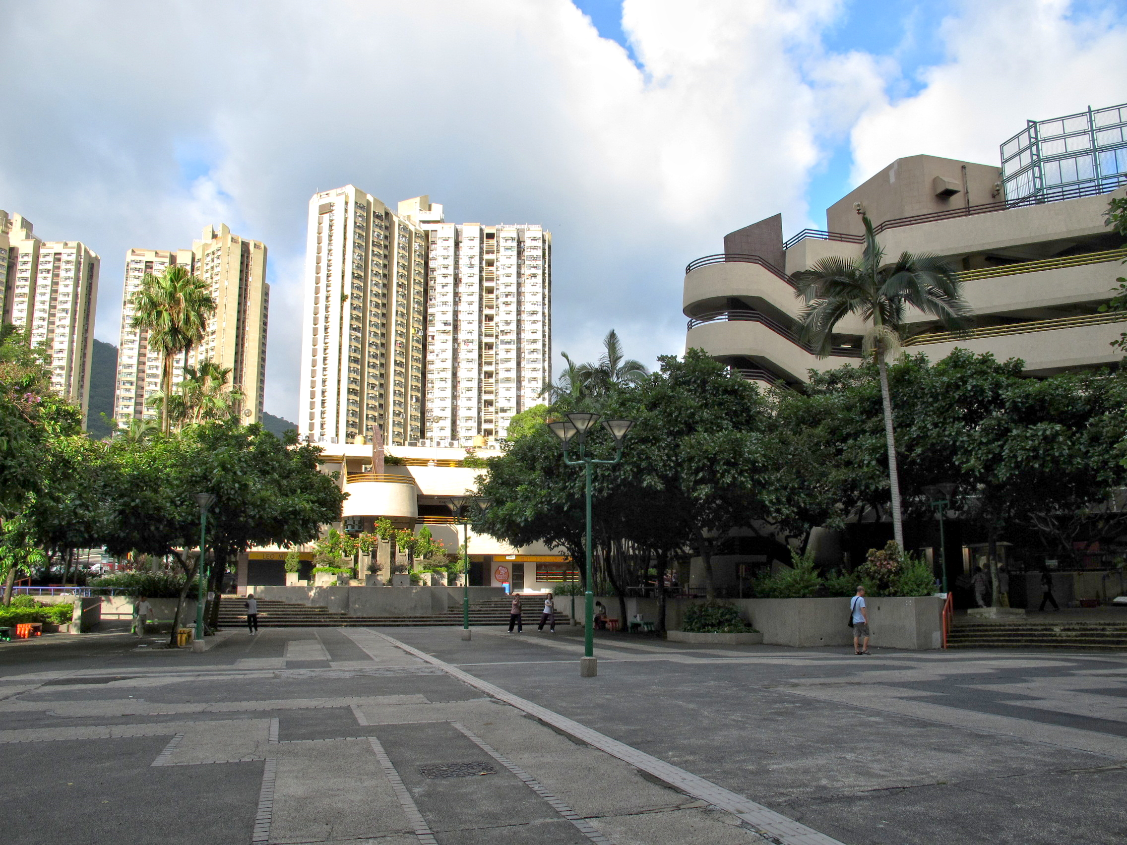 Hin Keng Estate Market Square